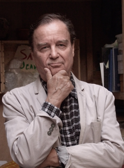 Portrait de Jean-Max Albert 20 septembre 2014